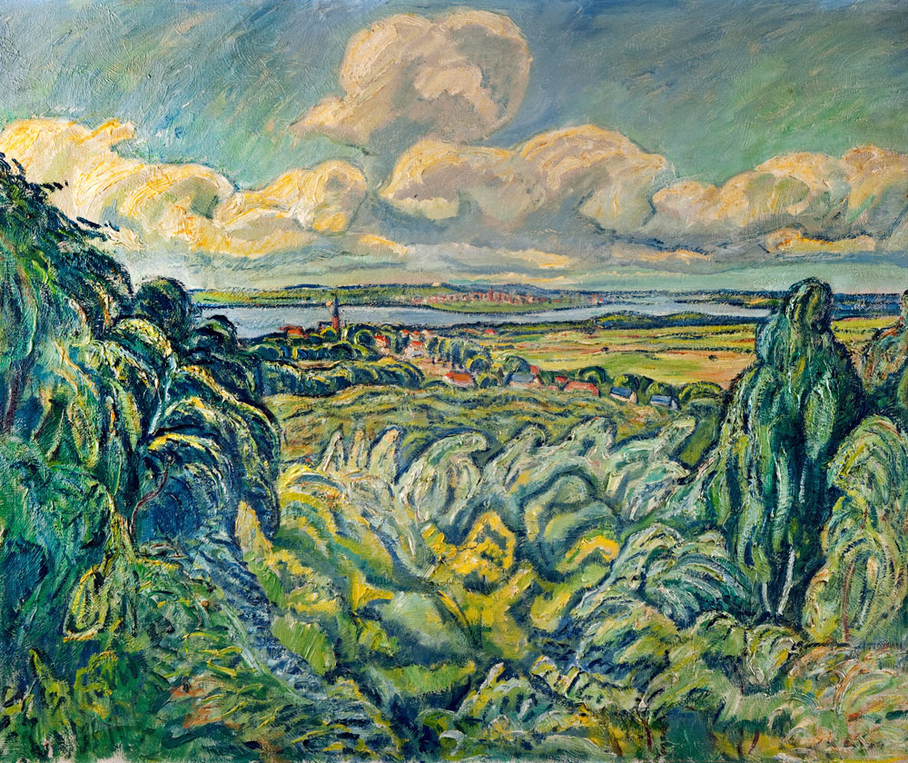 Blick auf Geltow am Schwielowsee